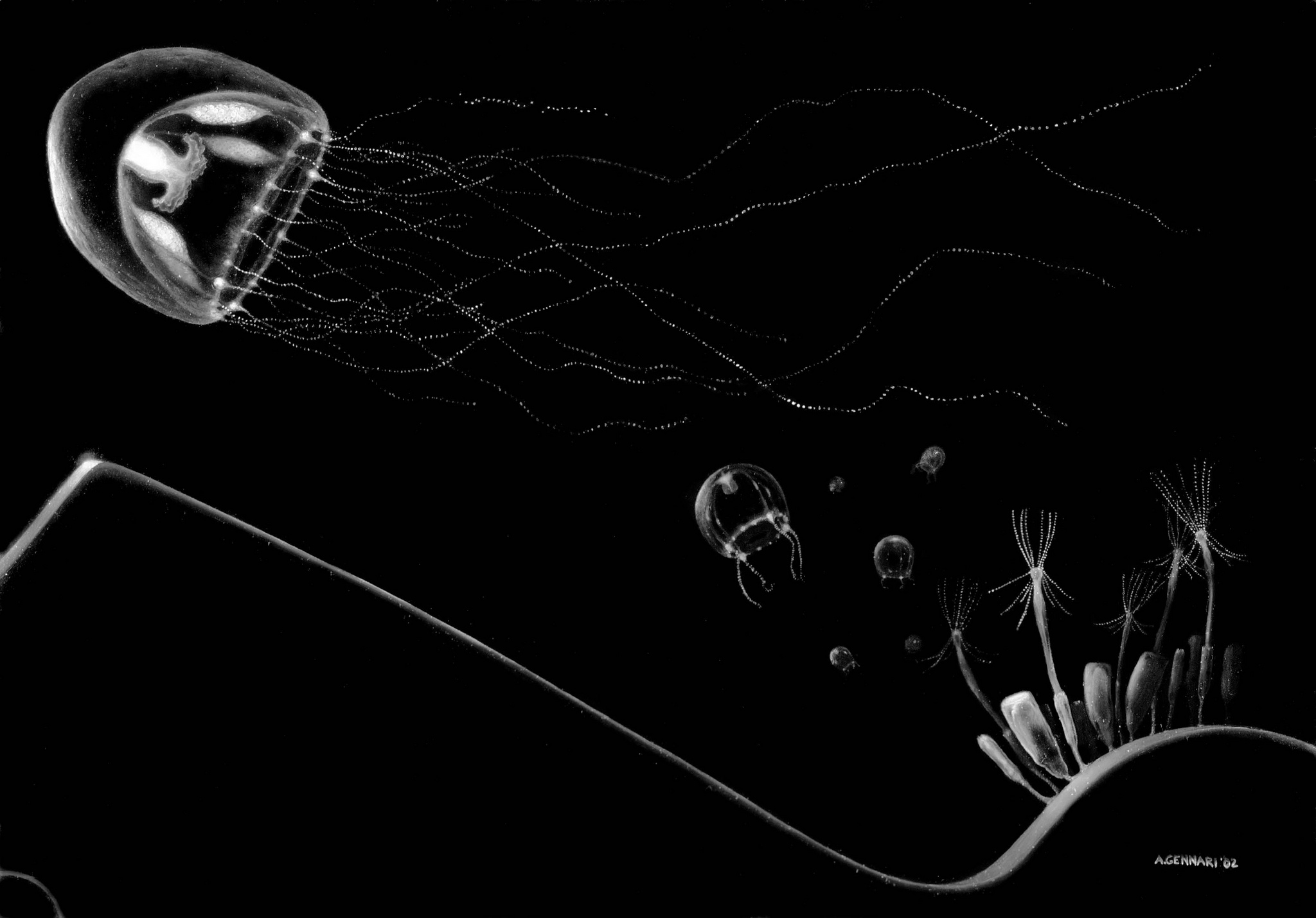 il ciclo di Phialella zappai disegnato da Alberto Gennari